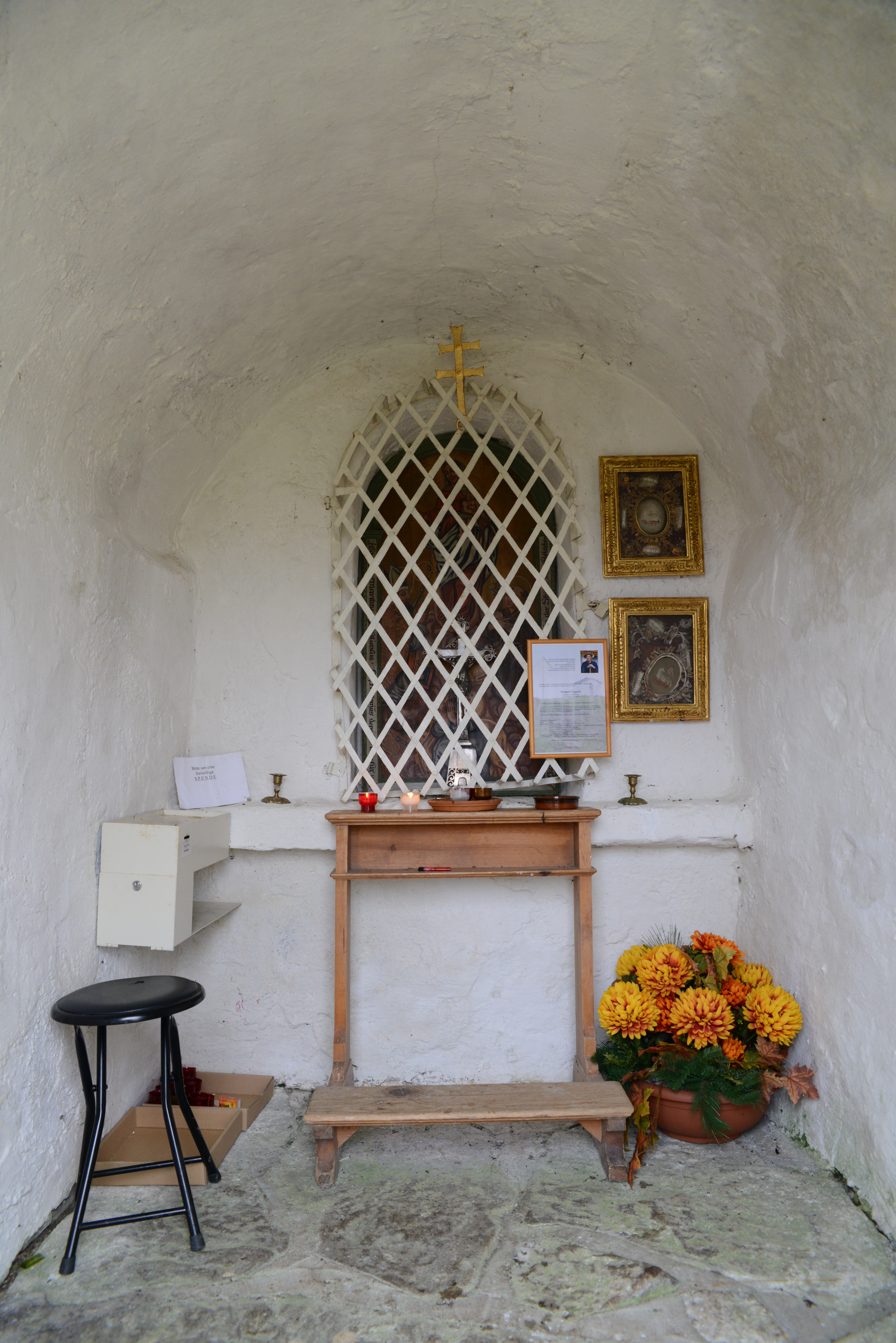 Kapelle Stofel bei der Alpe Oberdamüls; Info Das Objekt steht unter Denkmalschutz.